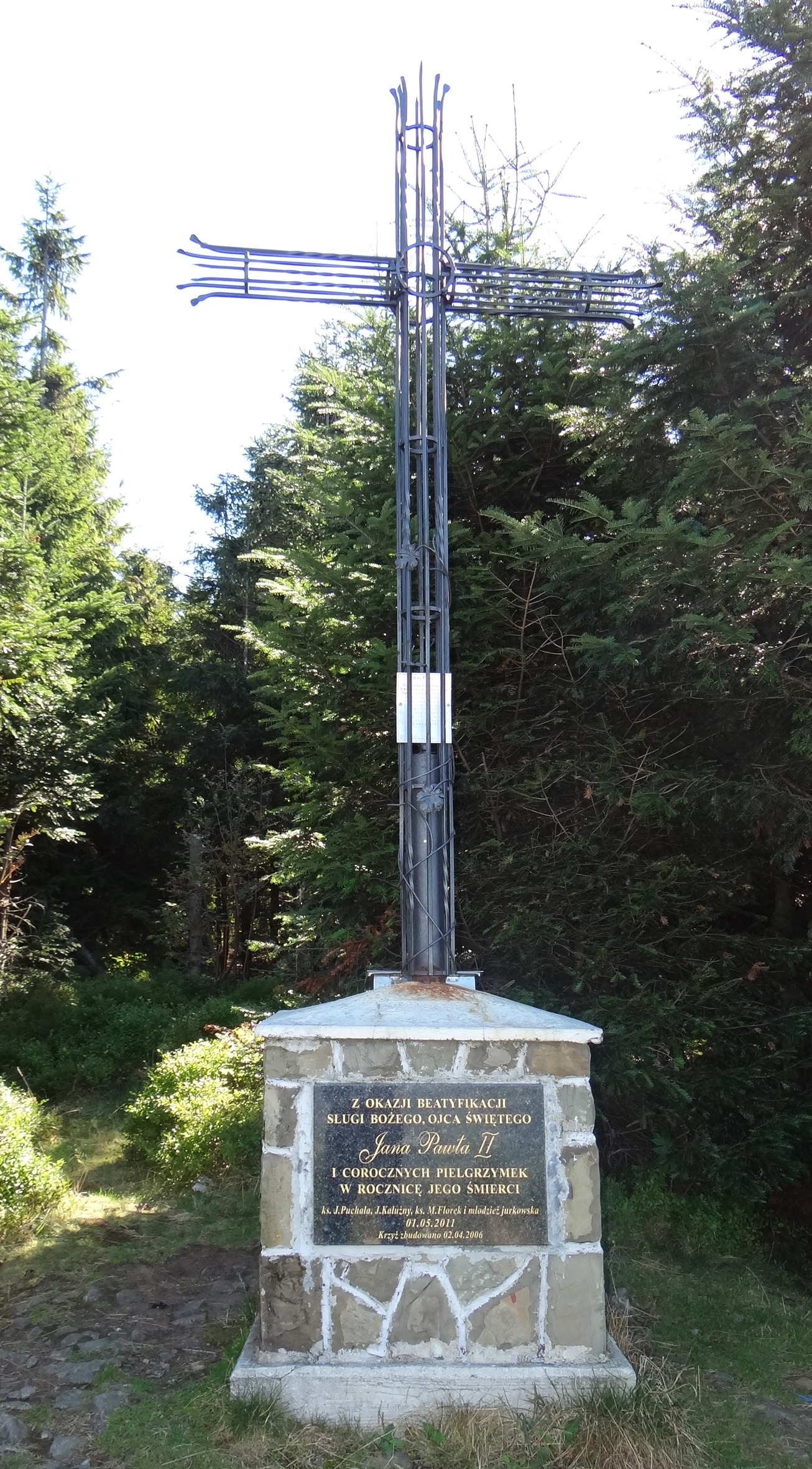 Krzyż na polanie Widny Zrąbek na Łopieniu